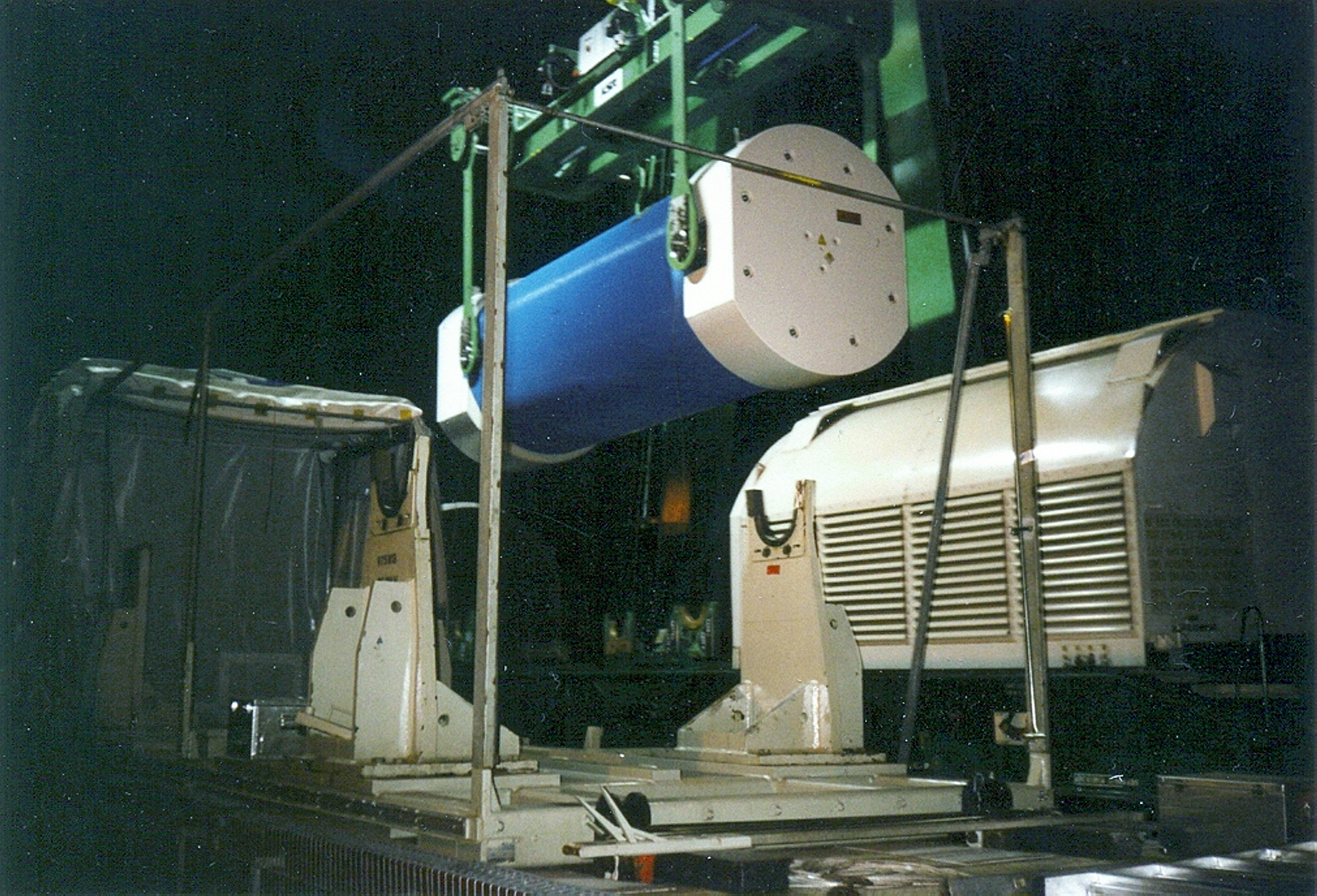 Verladung eines Castor Behälter im März 2001 in Dannenberg; 10. Castortransport nach Gorleben/Wendland